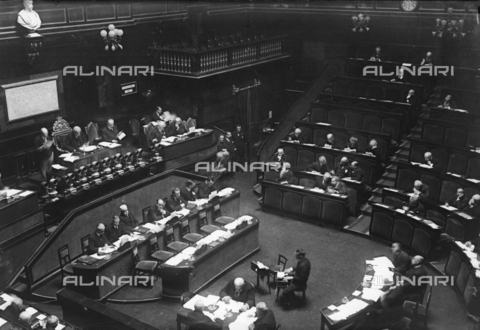 Aula del Senato